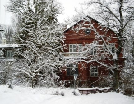 Talvine peahoone, suvel ei jäägi seal õieti midagi pildi peale.